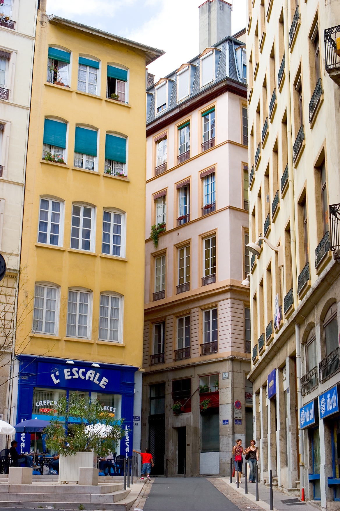 Place du Griffon, Lyon, France.